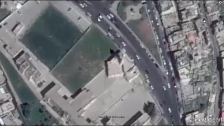 المسجد من الأعلى